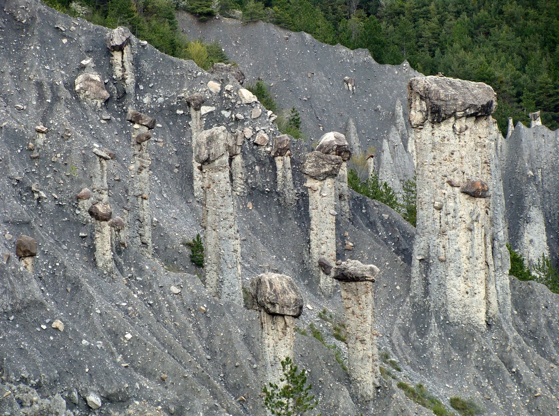 Groupe de cheminées de fée dans la "Salle du bal des demoiselles coiffées" de Théus. On voit nettement le sol meuble (marnes), les colonnes calcifiées, et les chapeaux rocheux.